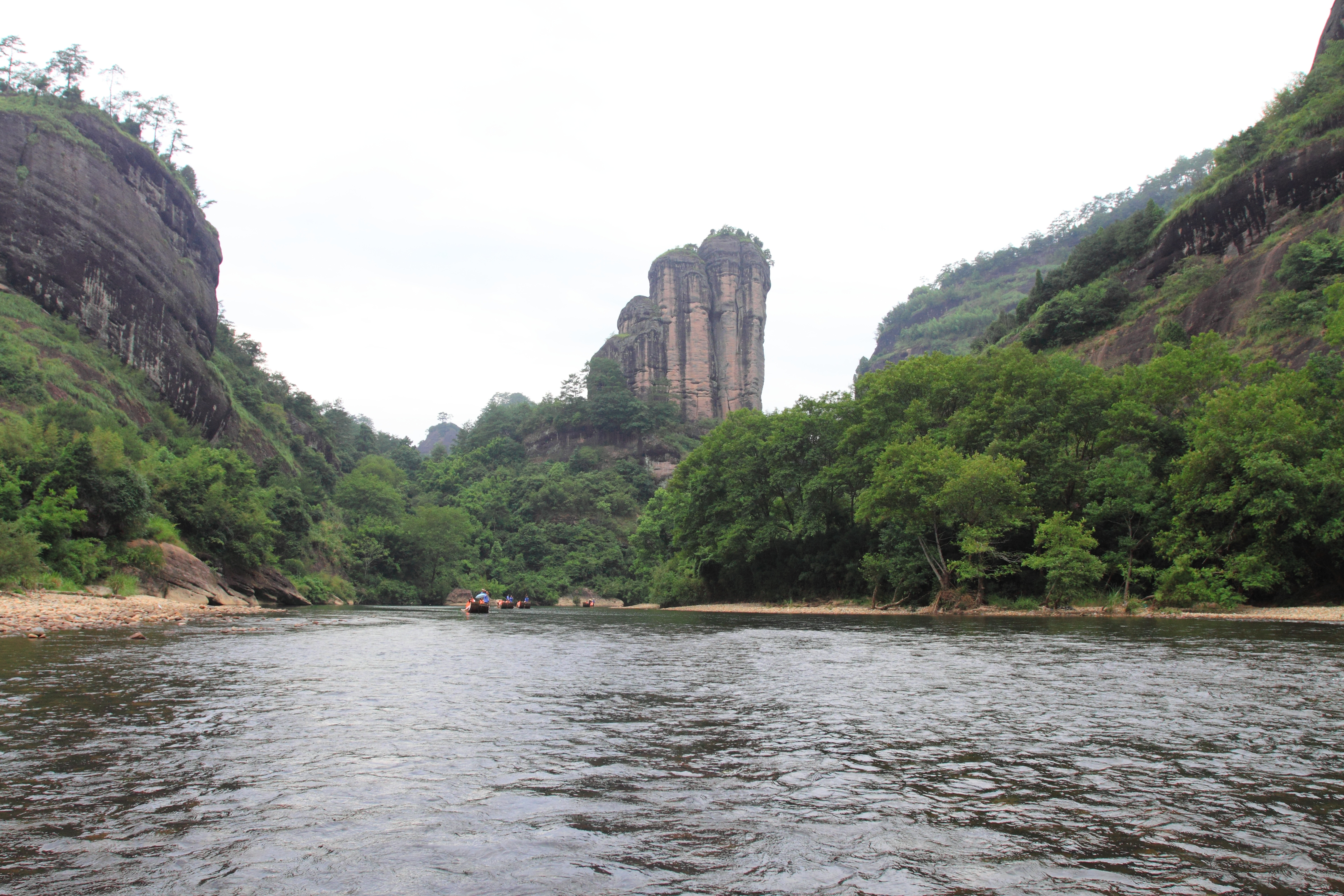 九曲溪——二曲（玉女峰）